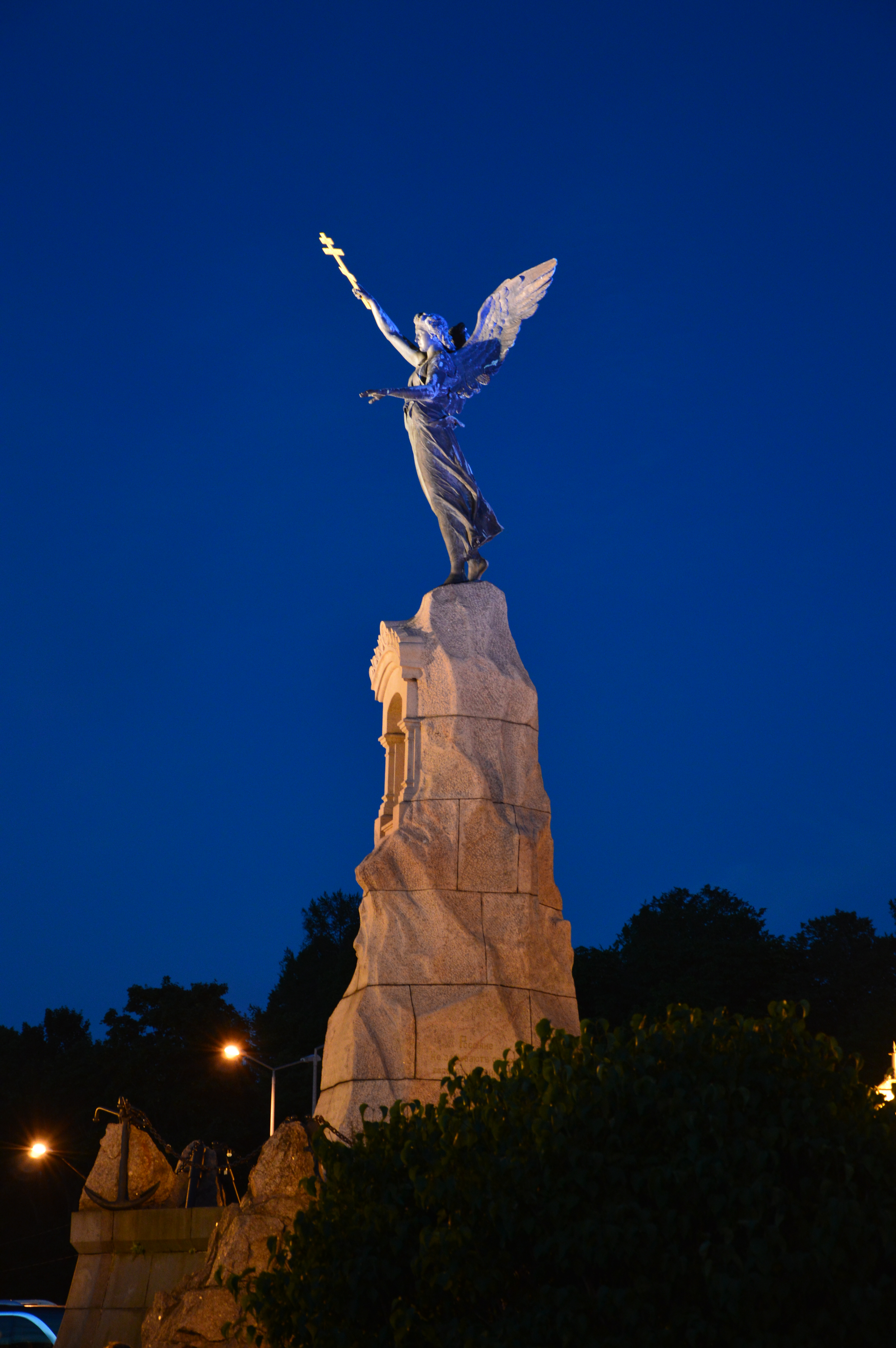 "Russalka" mälestussammas